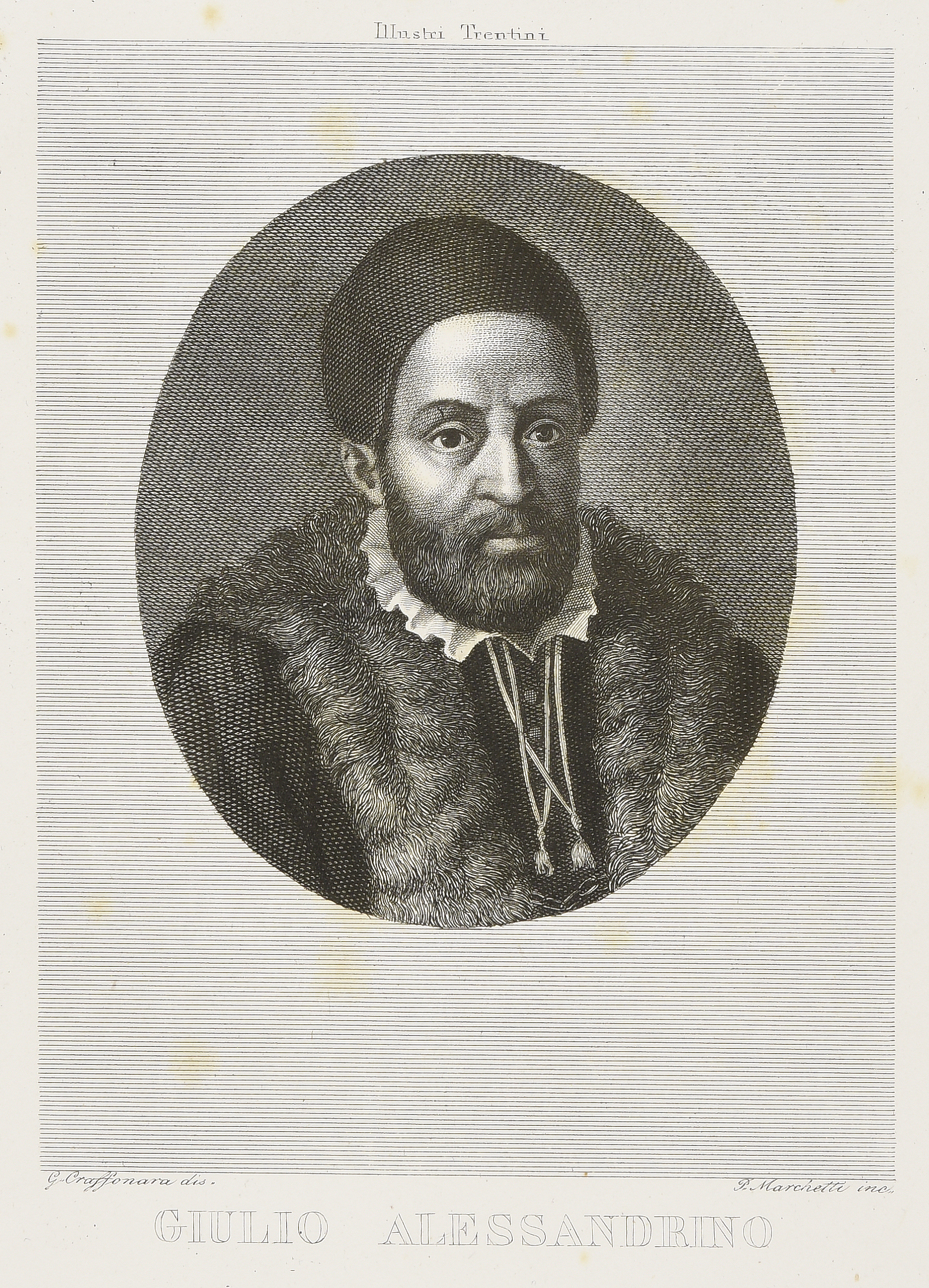 Giulio Alessandrino, Trento, Marietti Giuseppe, 1830